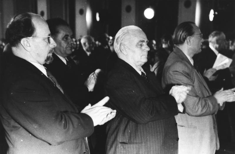 Berlin, DDR-Gründung, Ulbricht, Pieck, Grotewohl Zentralbild/Heilig Gründung der Deutschen Demokratischen Republik am 7.10.1949 Im Gebäude der DWK (Deutsche Wirtschaftskommission) in der Leipziger Straße in Berlin fand am 7.10.1949 die 9. Tagung des Deutschen Volksrates statt, auf der die DDR gegründet und das Manifest "Die Nationalen Front des demokratischen Deutschland" verabschiedet wurde. UBz: v.l.n.r.: Walter Ulbricht, Wilhelm Pieck, Otto Grotewohl. Abgebildete Personen: Ulbricht, Walter: Staatsratsvorsitzender, Erster Sekretär des Zentralkomitees (ZK) der SED, Vorsitzender des Nationalen Verteidigungsrates, DDR Grotewohl, Otto: Ministerpräsident, stellvertretender Staatsratsvorsitzender, DDR Pieck, Wilhelm: Präsident, Politbüro der SED, Vorsitzender der KPD, DDR